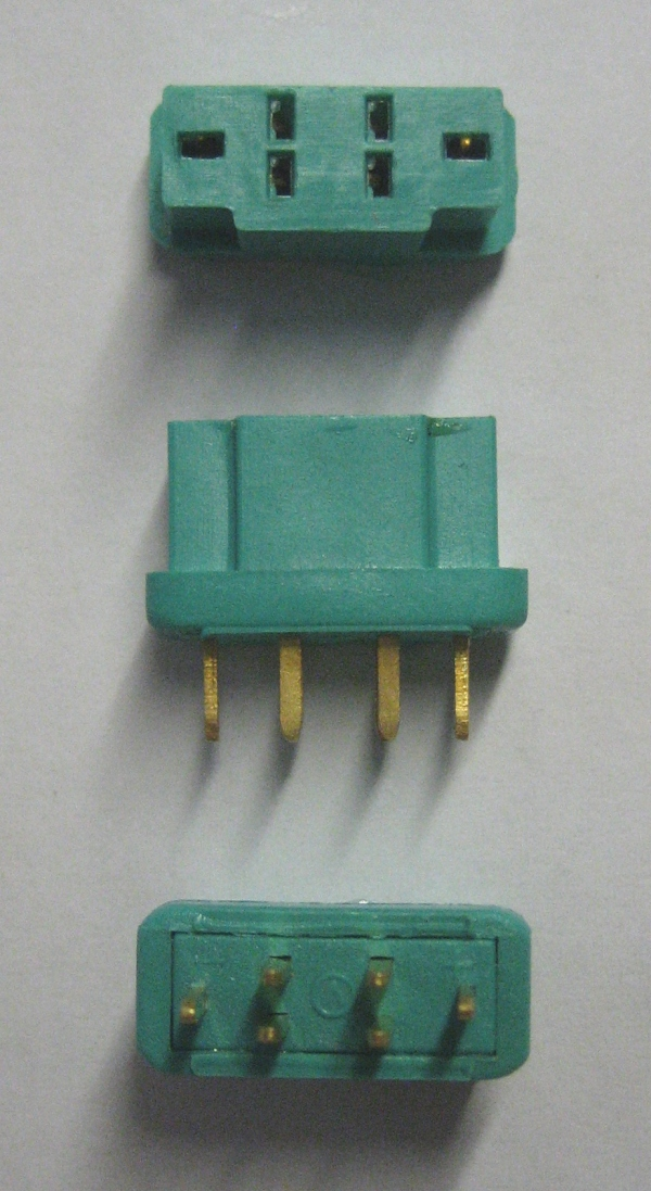 MPX connector